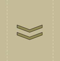 ՀՀ ԶՈՒ կրտսեր սերժանտ զինվորական կոչում